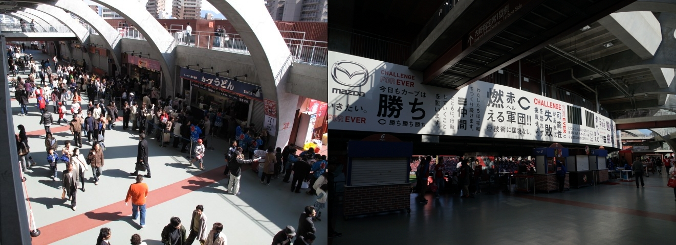 マツダスタジアムのコンコース内部（2009年4月）、およびその壁面（2016年3月）を本人撮影